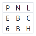 De postzegelcode met negen karakters die voor binnenlandse poststukken gebruikt kan worden.